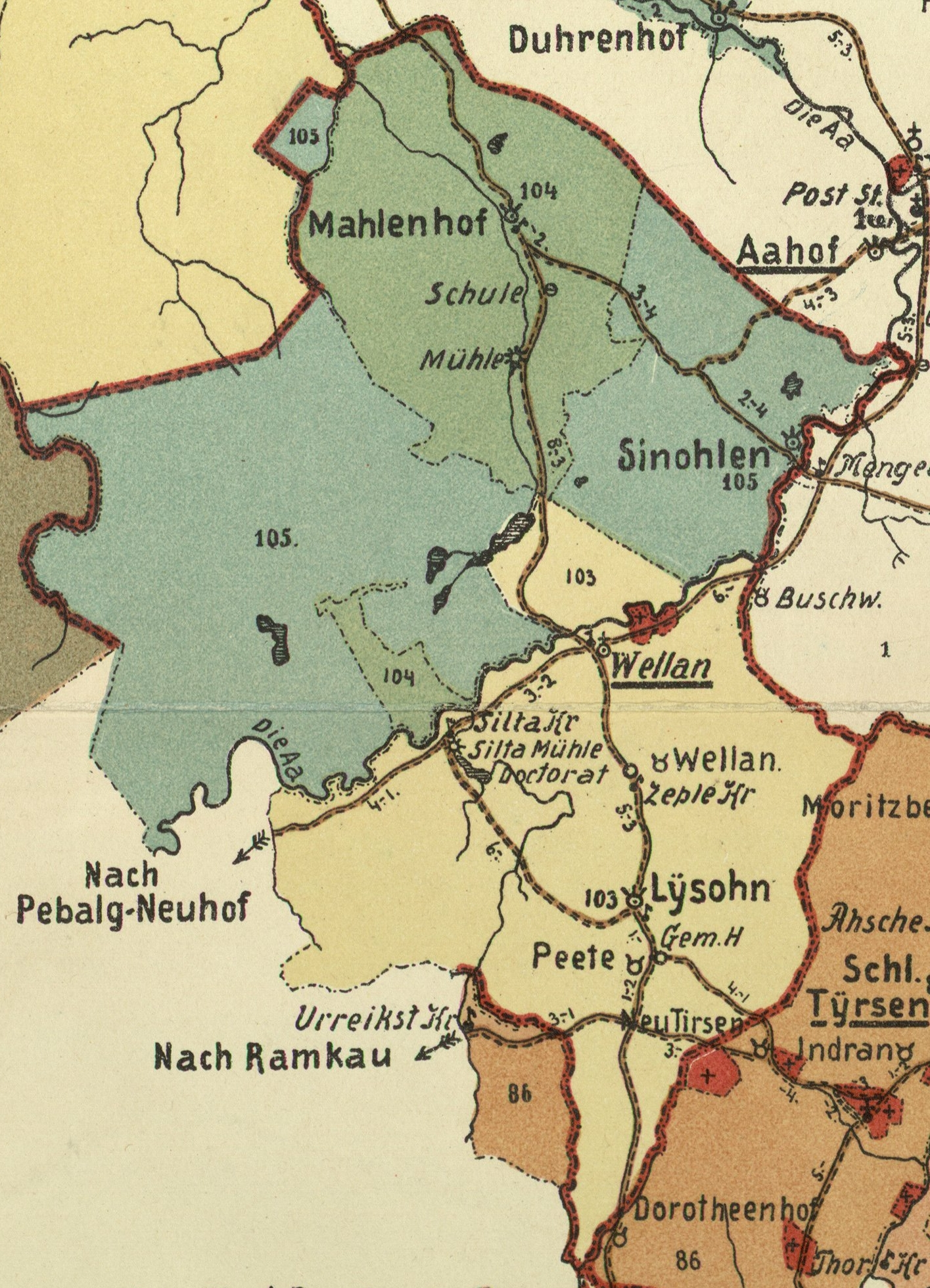 Velēna kihelkonna mõisad 1904. aasta kaardil.